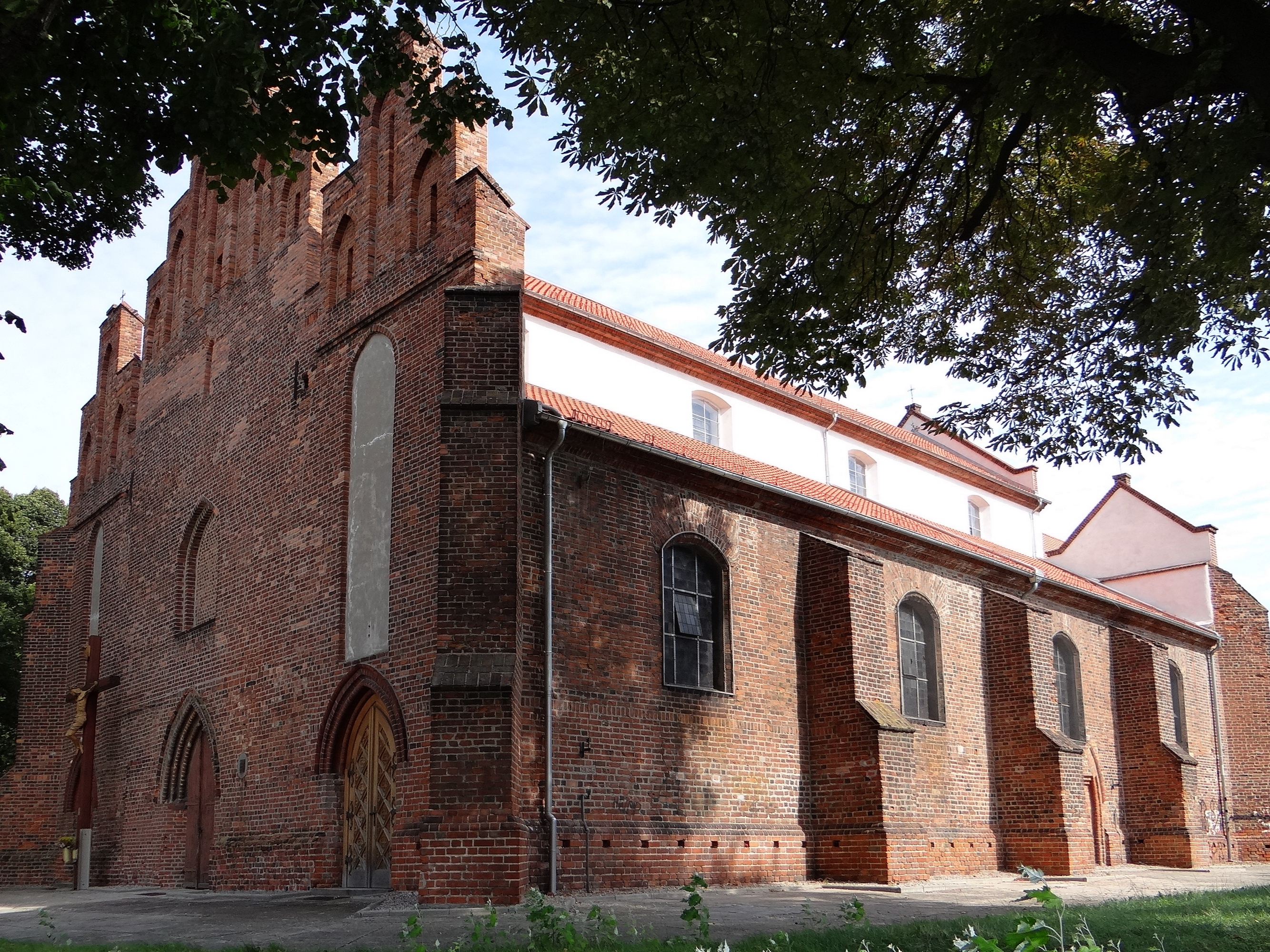 Inowrocław, kościół par. p.w. św. Mikołaja, XV/XVI, XVII